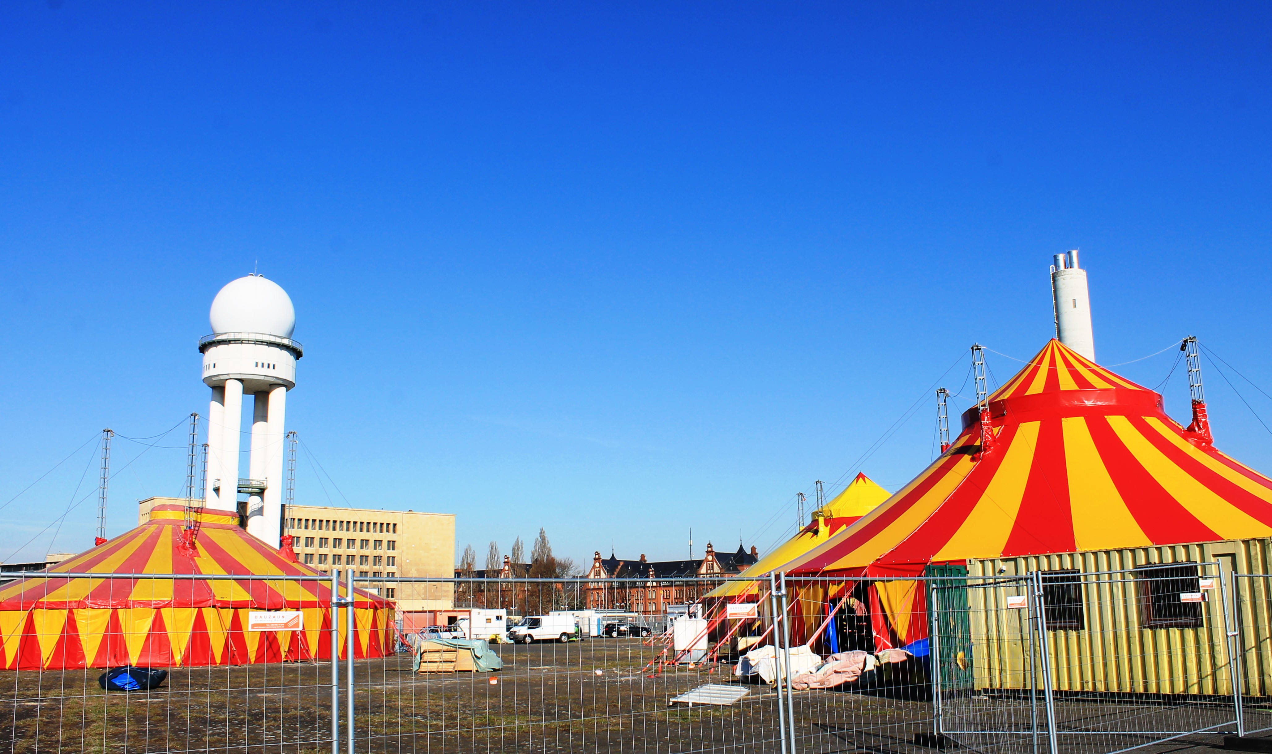 Kinderzirkus